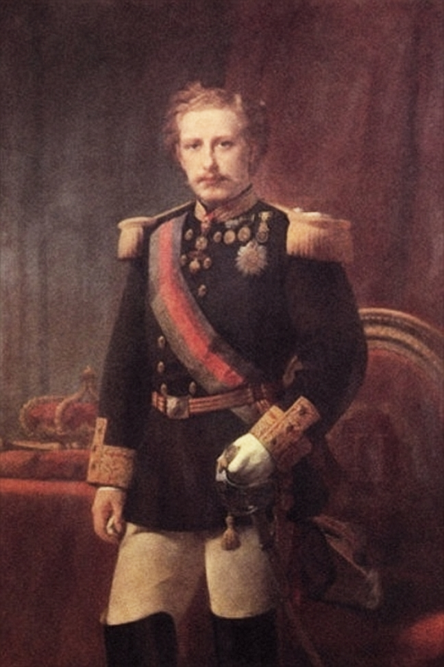 Rei D. Luís I de Portugal